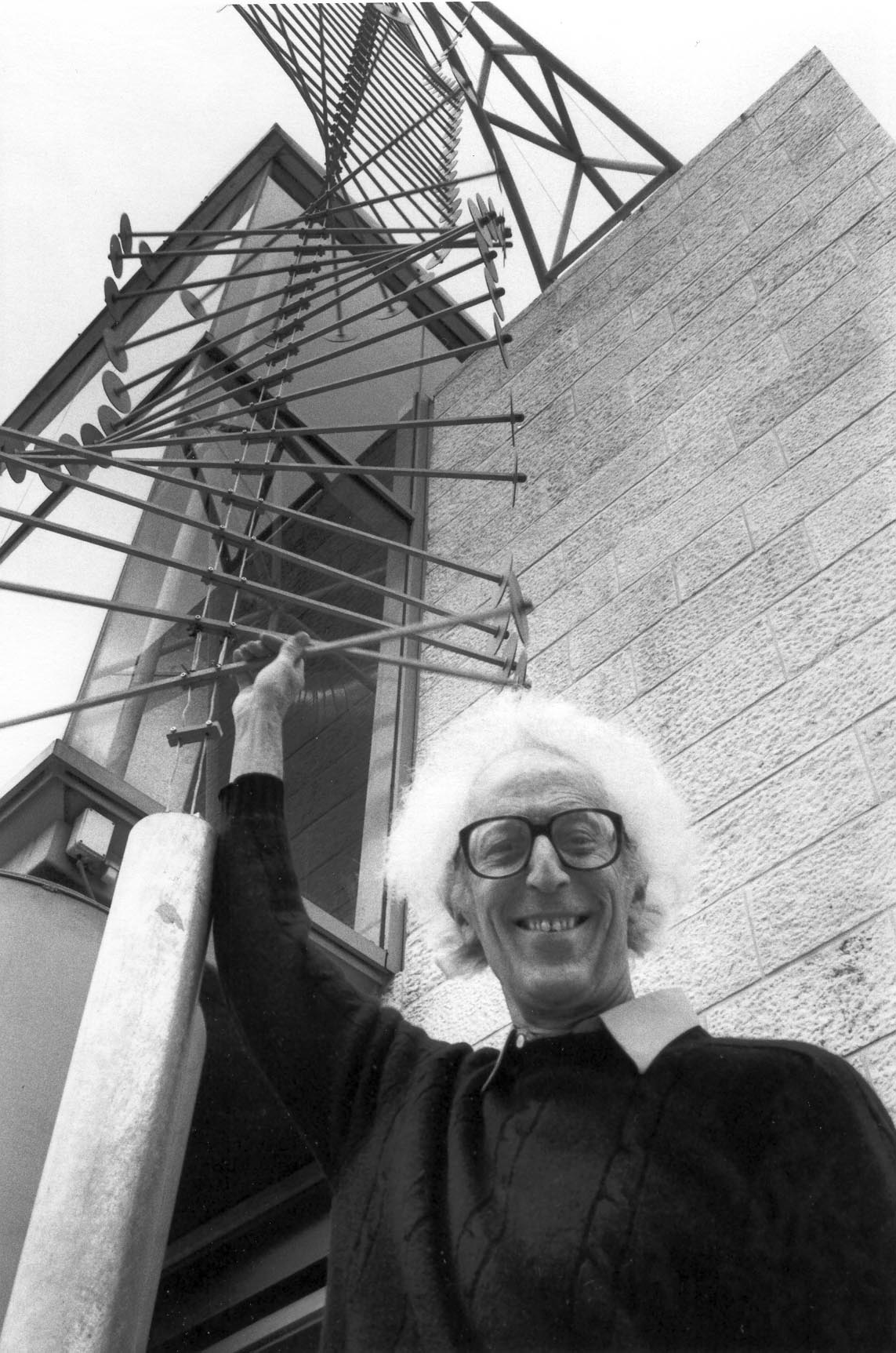 פיטר הילמן המייסד והמנהל הראשון של מוזיאון המדע ע"ש בלומפילד ירושלים